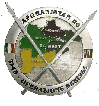 Stemma della Task Force 45, unità interforze delle forze speciali italiane.